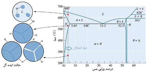 شماتیک مراحل پیر سختی الیاژ آلومینیم مس